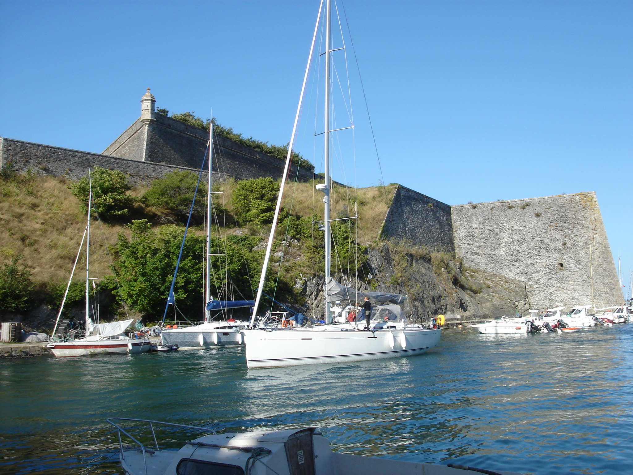 Port et citadelle de Palais (56), à Belle-Île-en-Mer, en Bretagne.